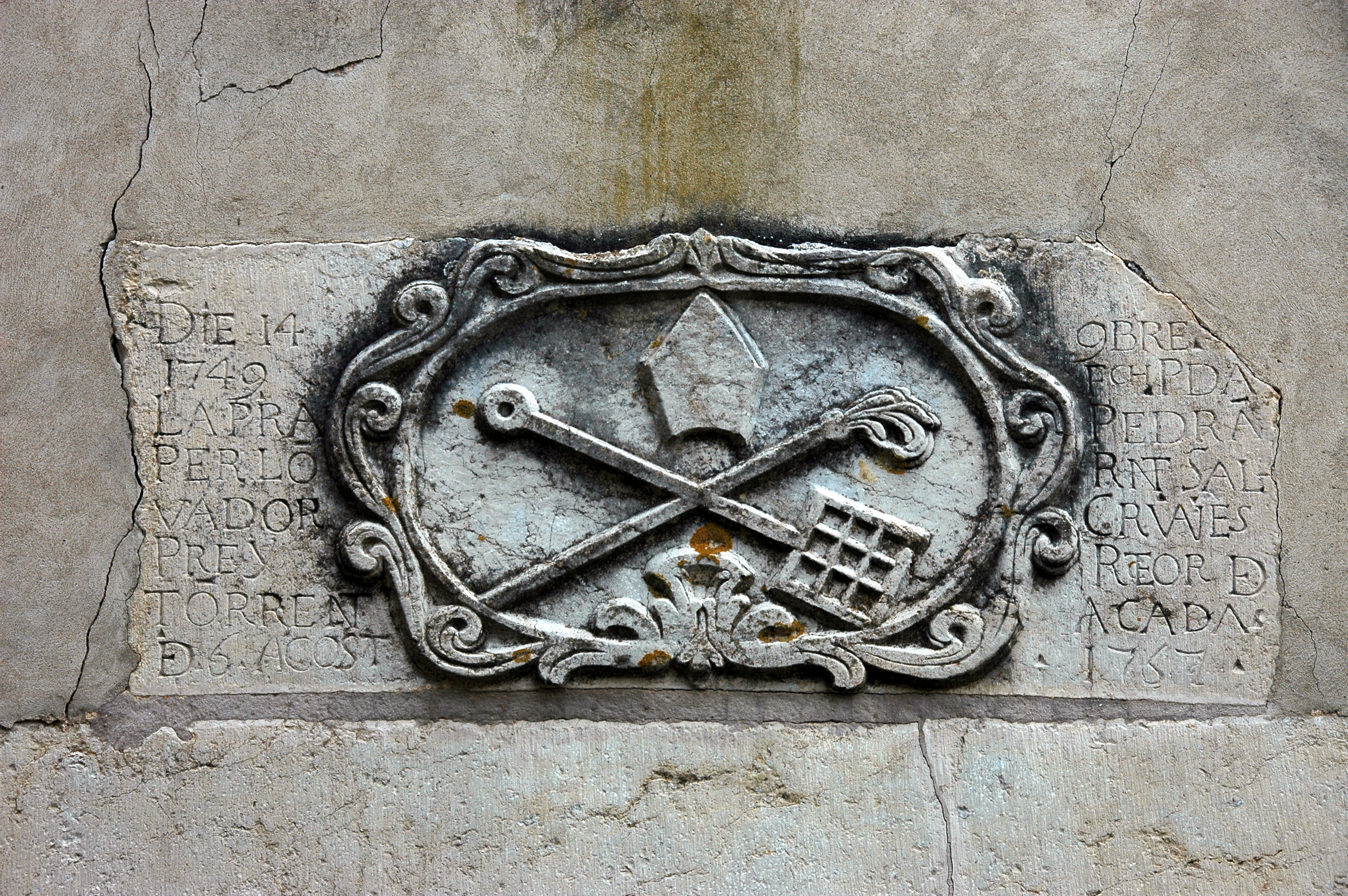 Detall de la llinda de sobre la porta del santuari de Sant Llop (Torrent).